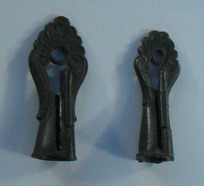 Tailles-crayon japonais 1910 - Objet personnel - Photo prise par moi même - LessayCatus 19:46, 3 December 2006 (UTC)